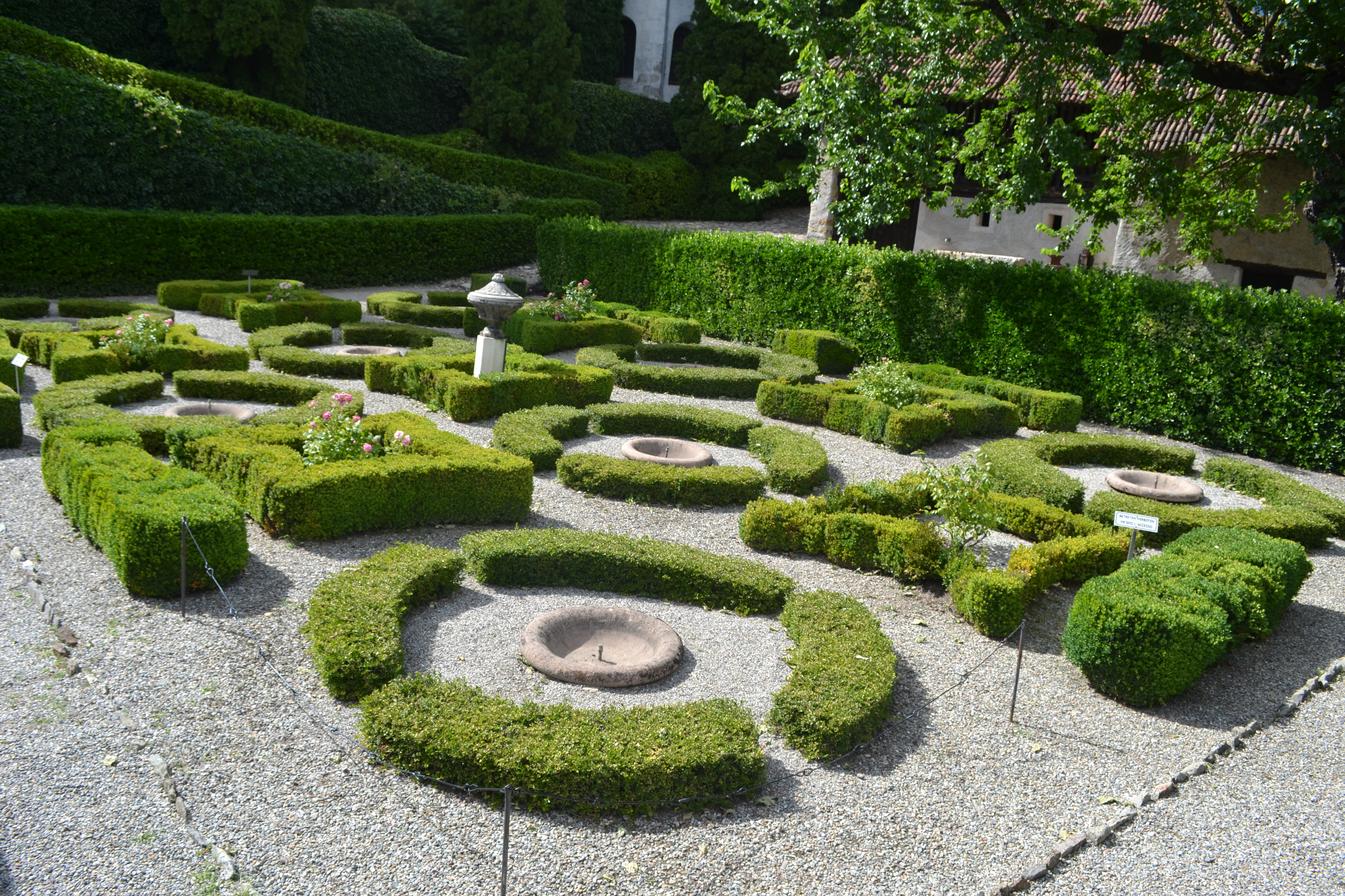 Rokoko-ghardeno en kastelo Lebenberg en Sudtirolo